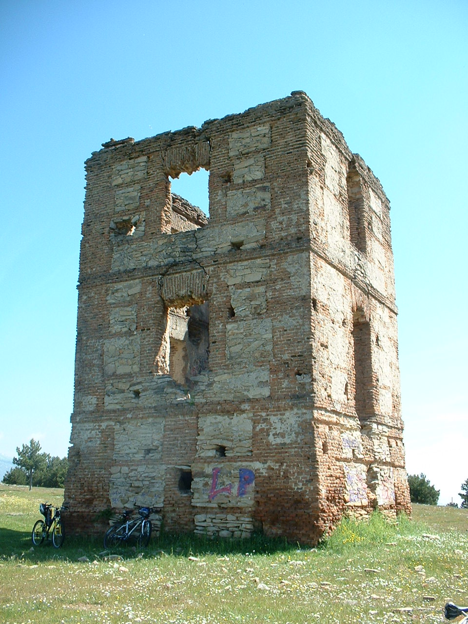 Ruinas de la torre óptica de Moralzarzal, en el cerro de Cabeza Mediana (Comunidad de Madrid). Antes de la restauración.Torre nº 5 de la línea de Castilla.